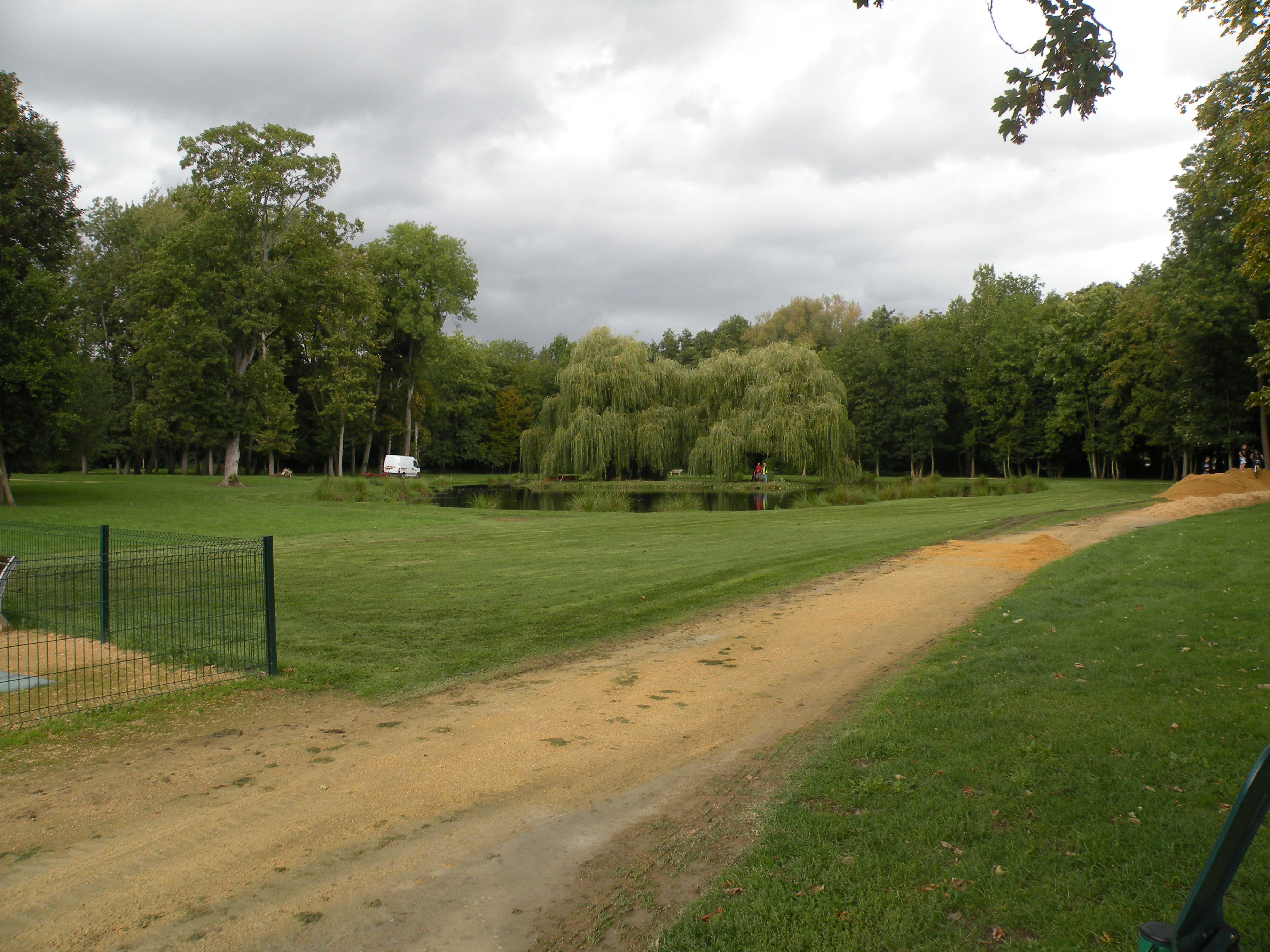 parc de mouy